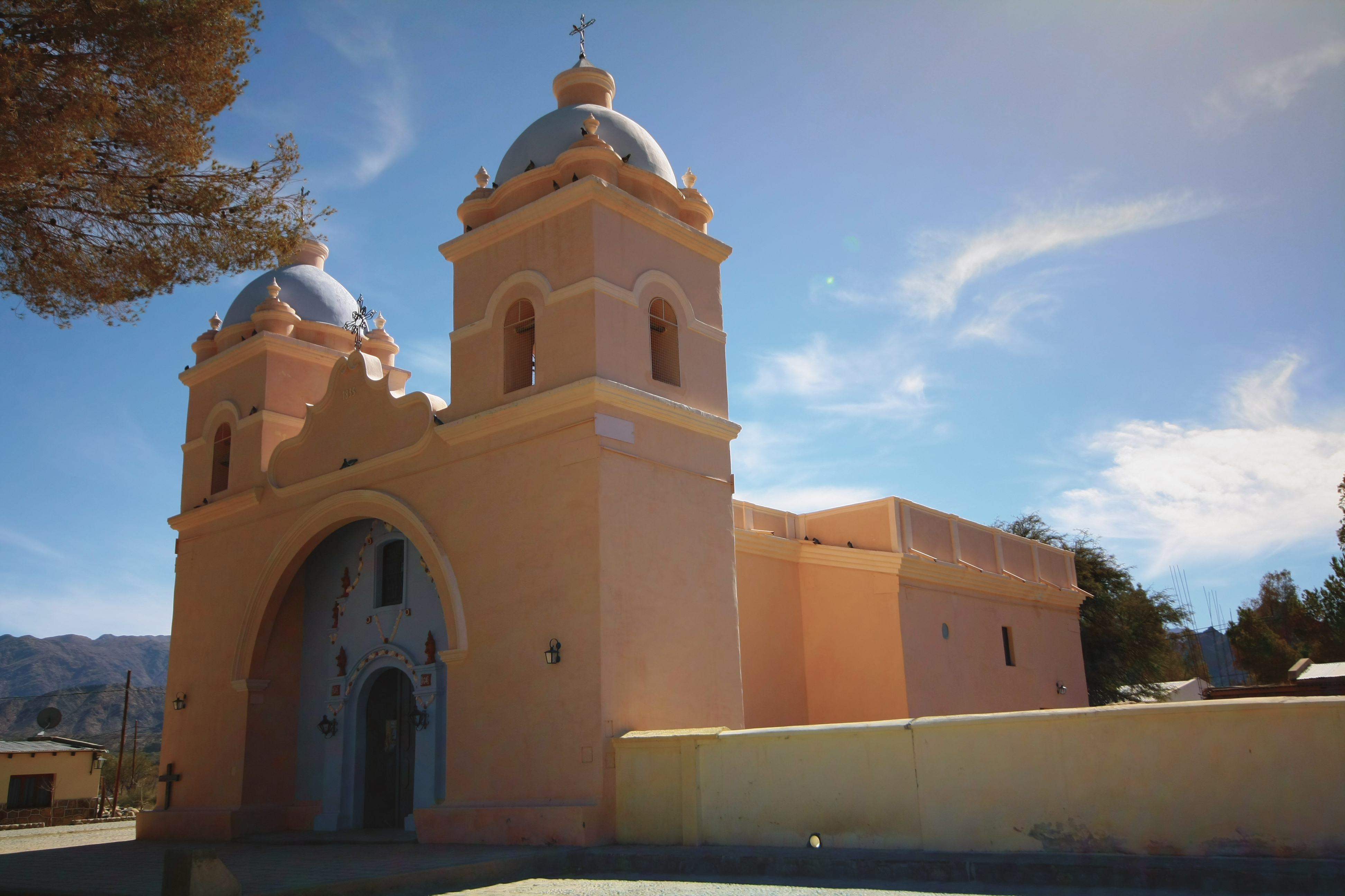 Iglesia de Seclantás